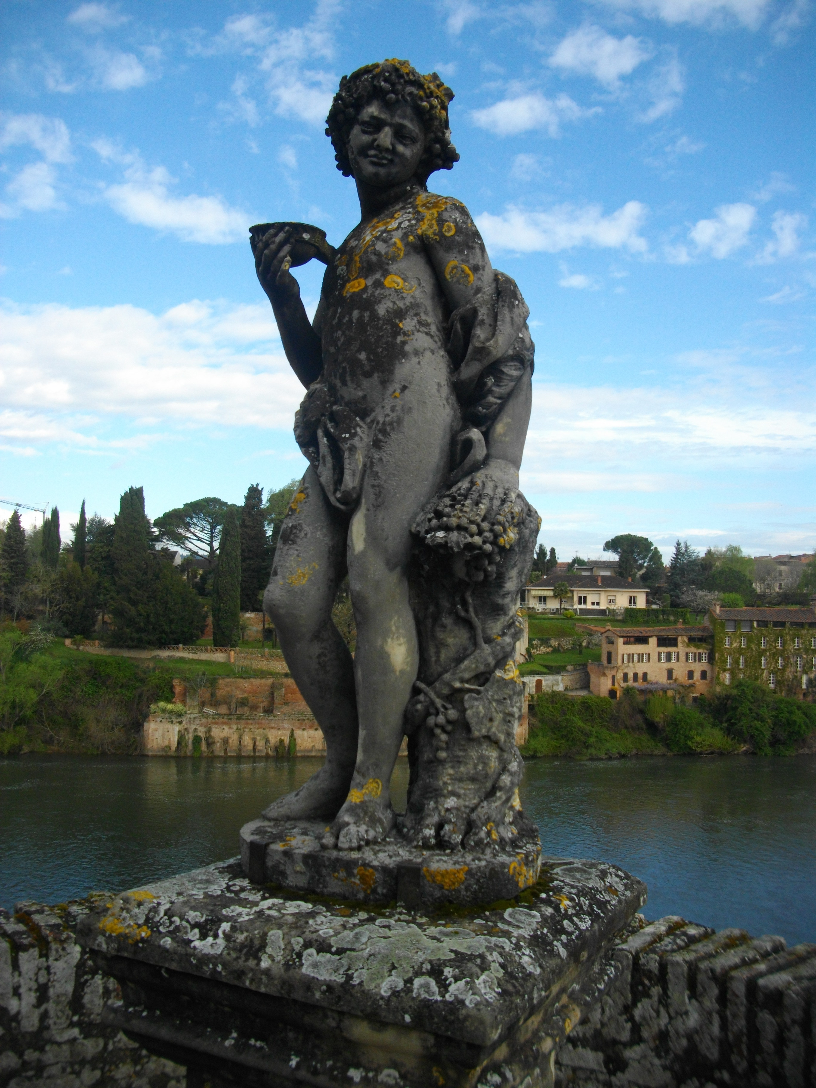 Statue du XVIIIème installée sur une tourelle de la promenade qui entoure le jardin. Elle est marquée par la mode du style antique de l'époque. En arrière plan, la rivière Tarn et les jardins suspendus de la rive droite.